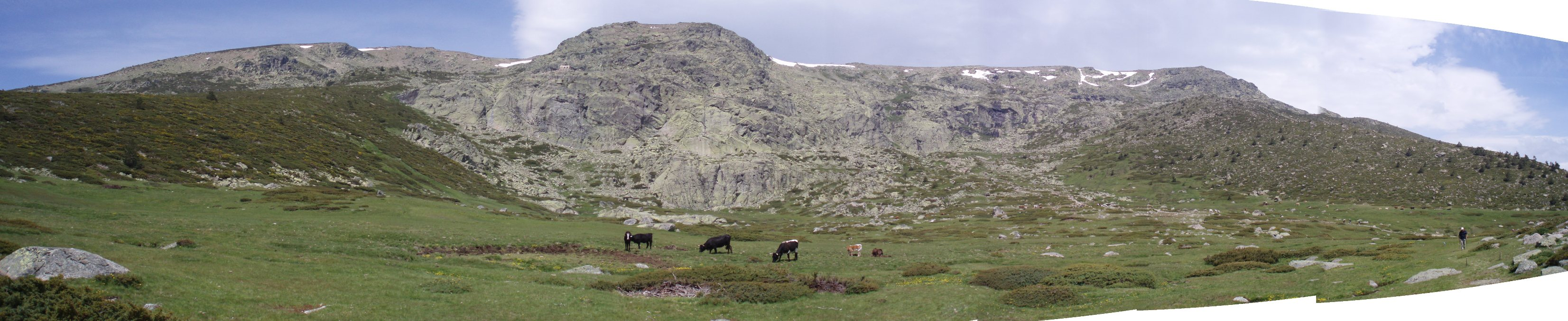 Circo glaciar de Peñalara, ubicado en la Comunidad de Madrid (España).